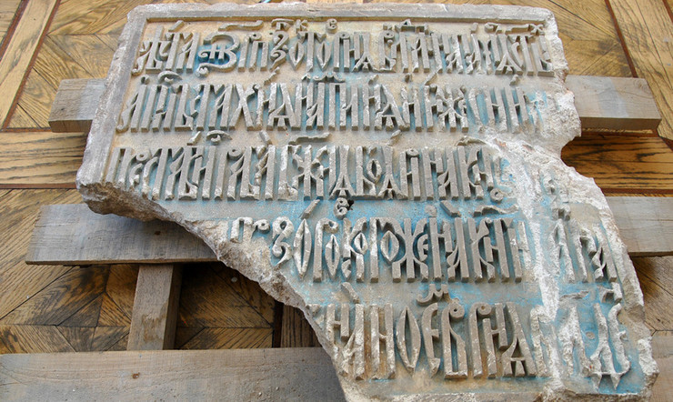 Надгробие княгини Анны Фёдоровны Прозоровской, урождённой Ртищевой (ок.1643-1678), супруги государственного деятеля князя Петра Прозоровского (1644-1720), найденное в Москве летом 2017 года при проведении работ у стен Сретенского монастыря и переданное музею Москвы.